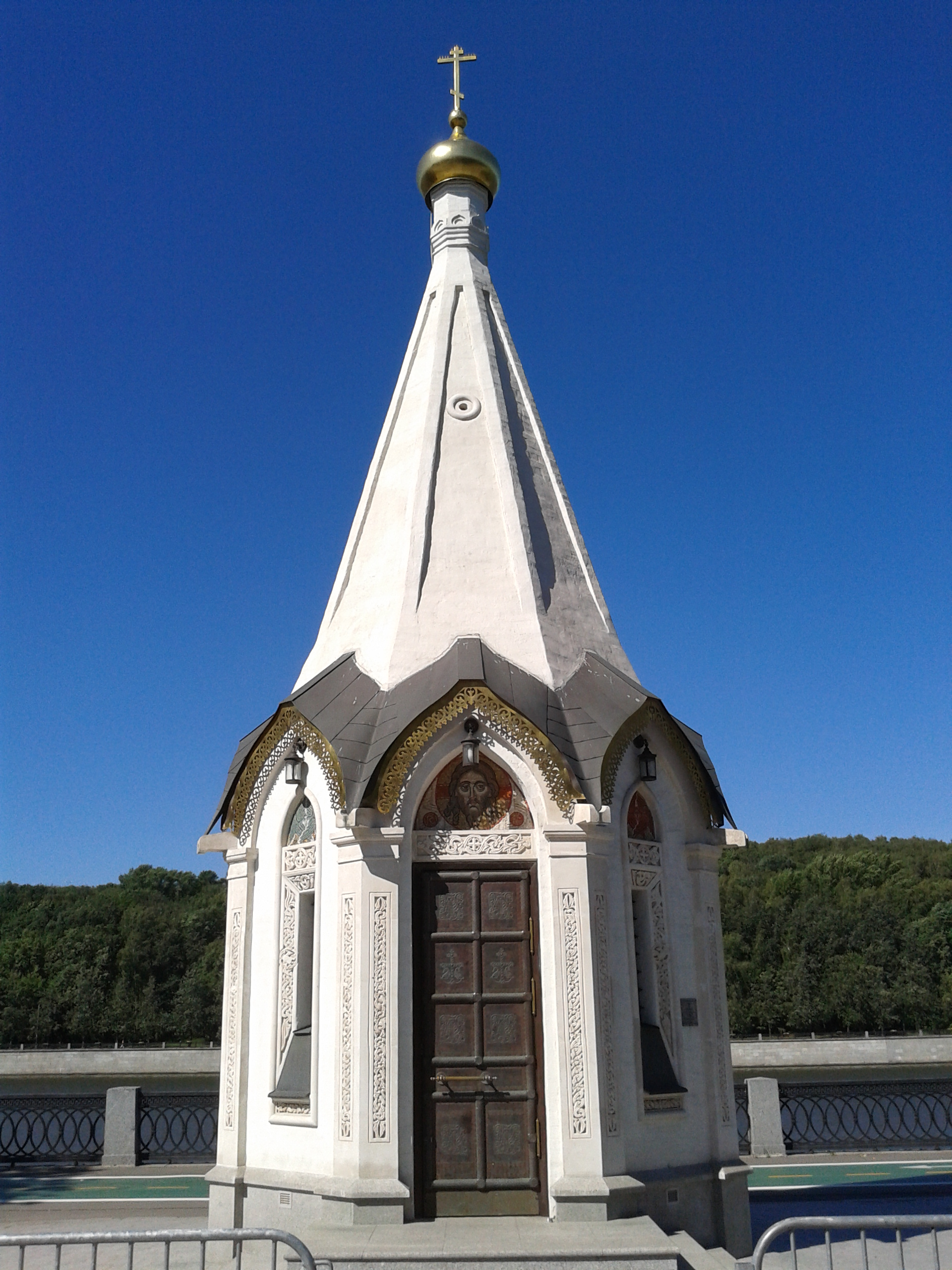 Часовня равноапостольного князя Владимира в Лужниках. Сзади часовни через Москву-реку видны Воробьёвы горы